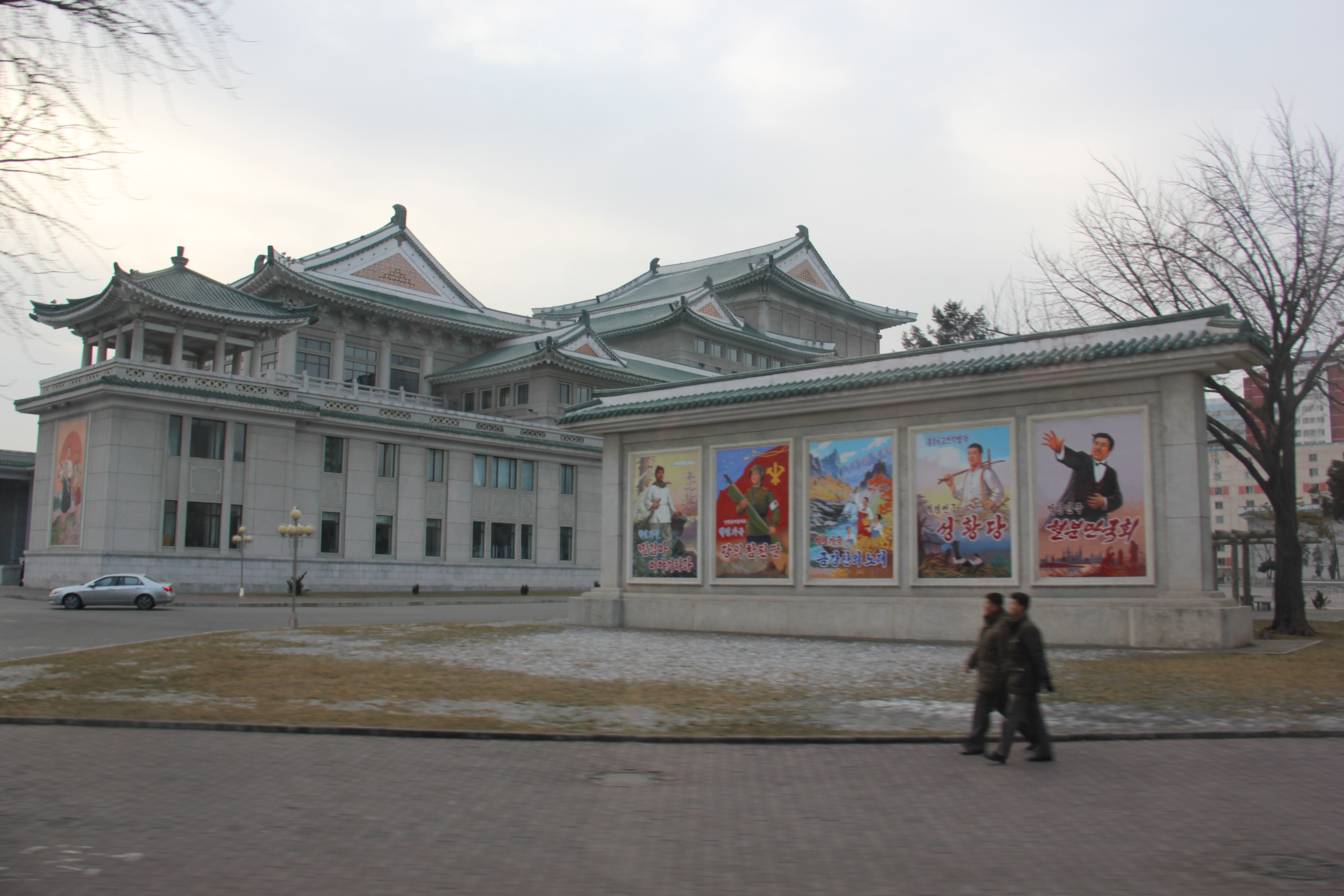 Pyongyang Grand Theater